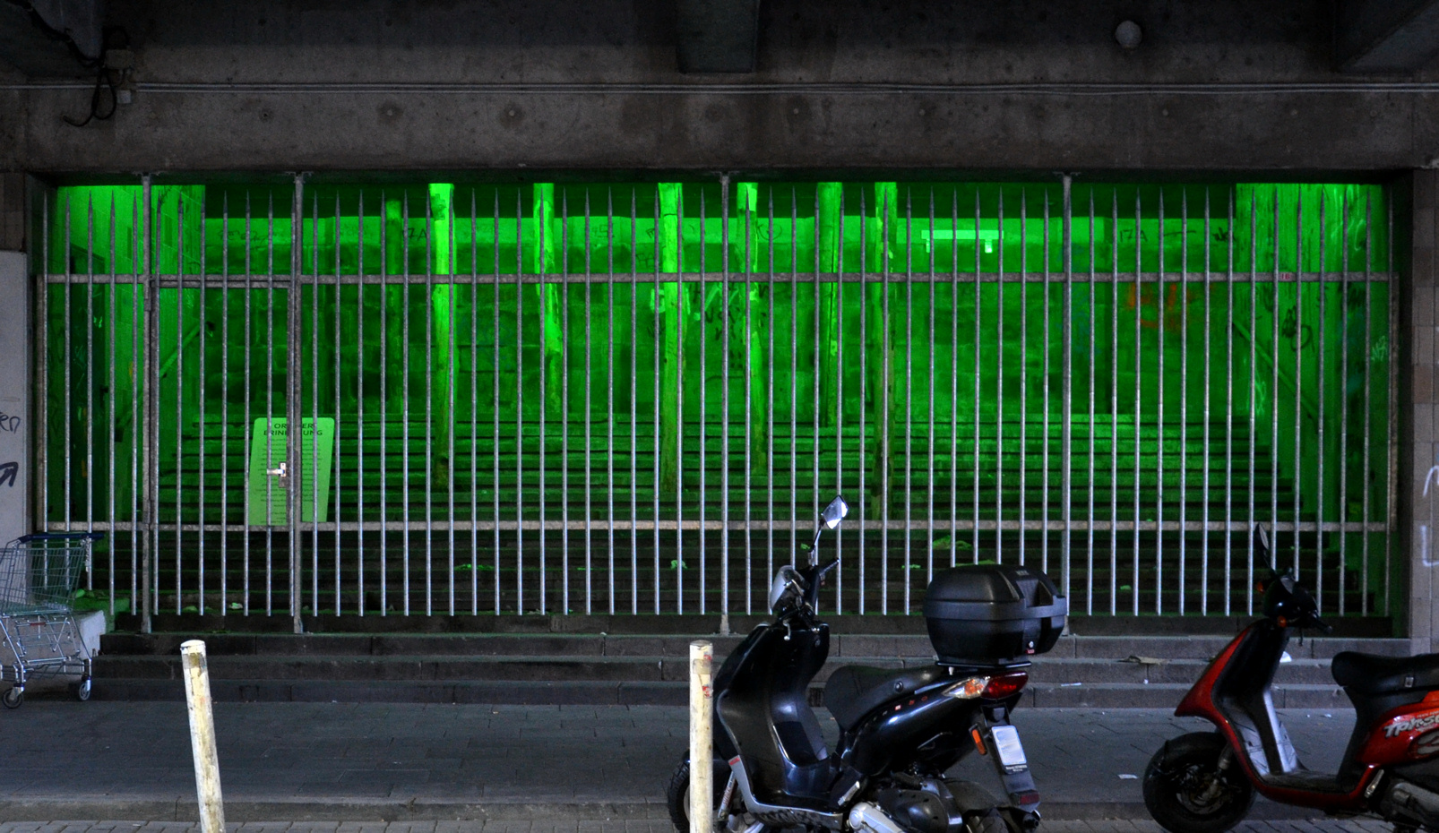 Gedenkstätte des KZ-Außenlagers Essen, Schwarze Poth, heute unter der Porschkanzel